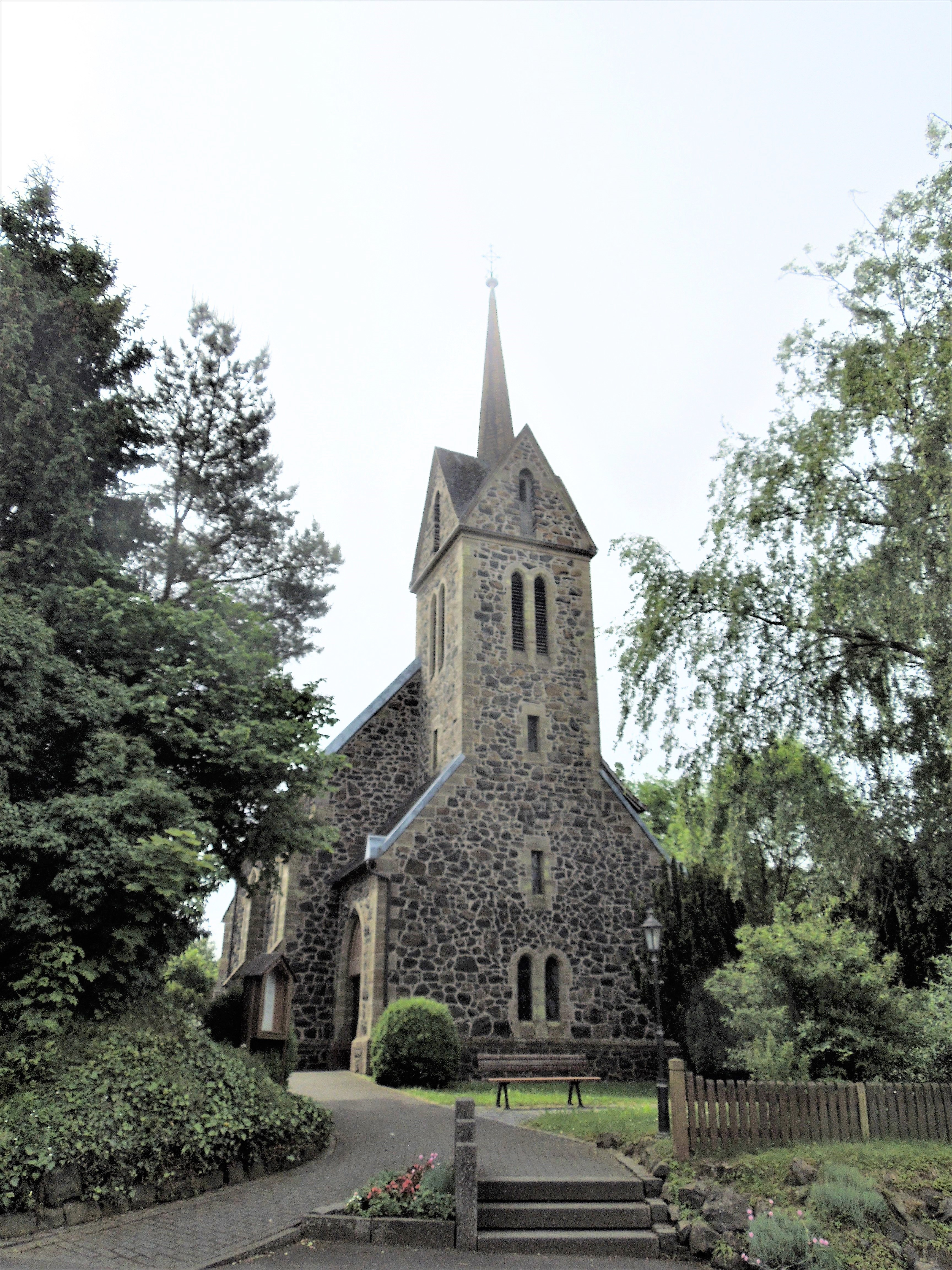 Hundsdorf, Dorfkirche